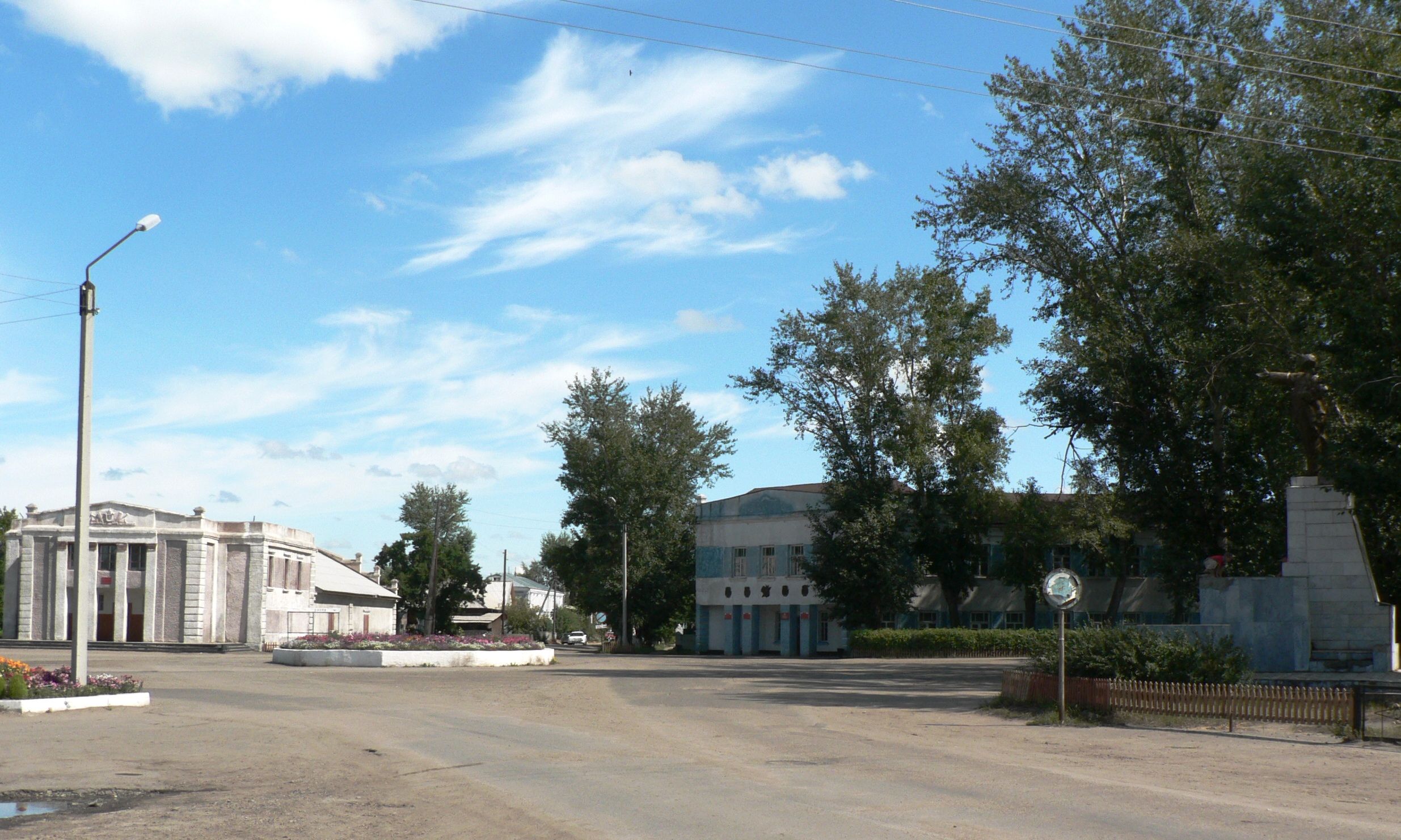 Центральная площадь с. Тюменцево